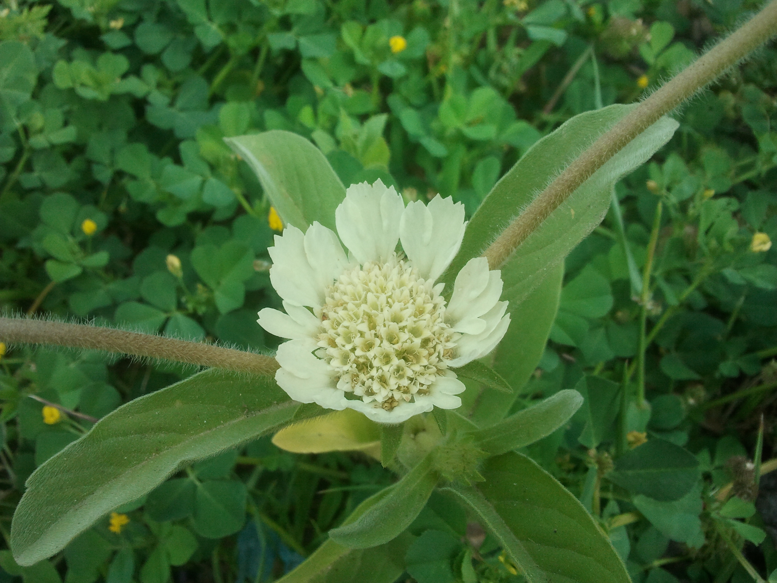 תגית מצויה על הכרמל, צמח חד שנתי פורח באביב